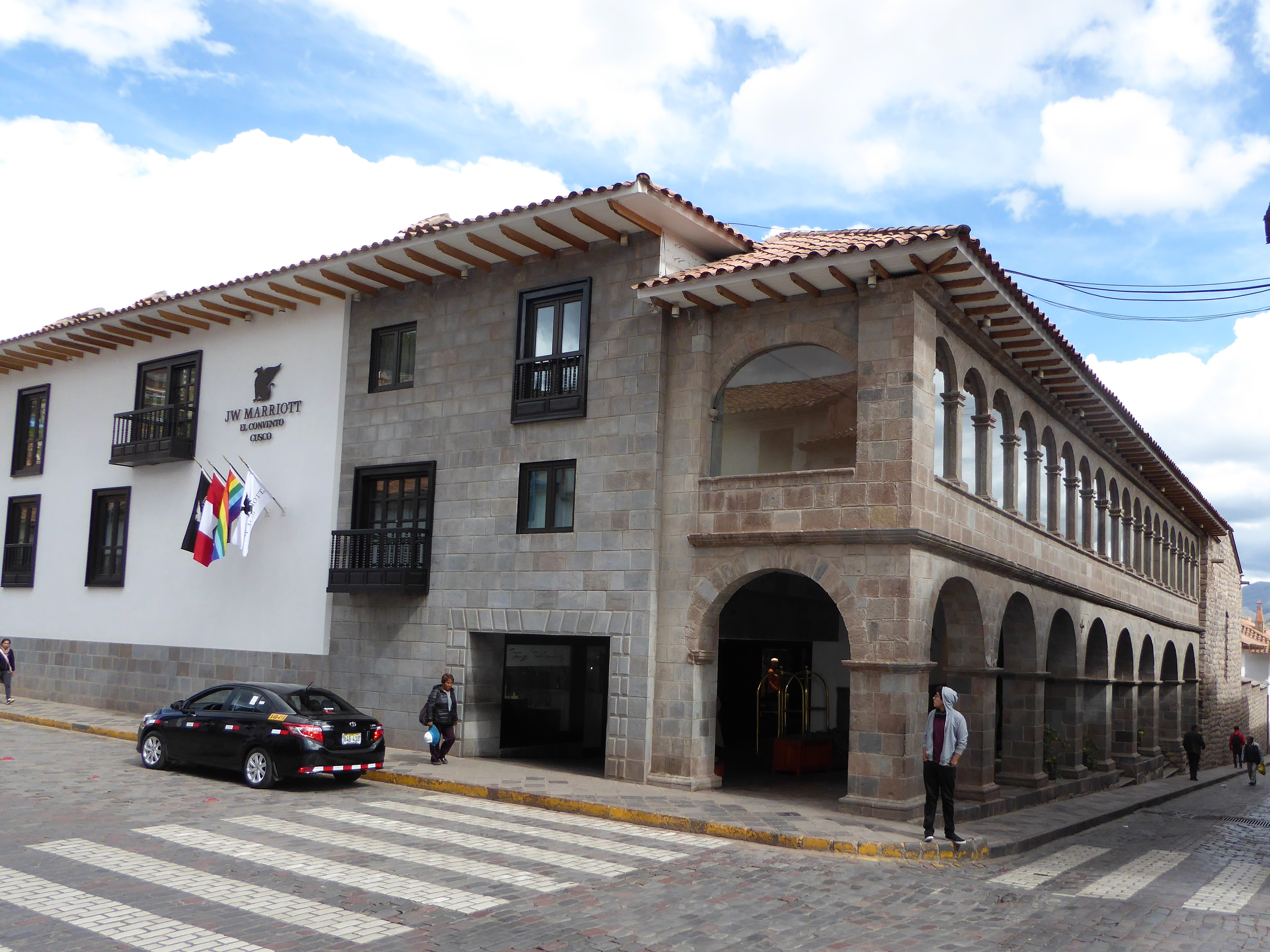 Das JW Marriot Cusco